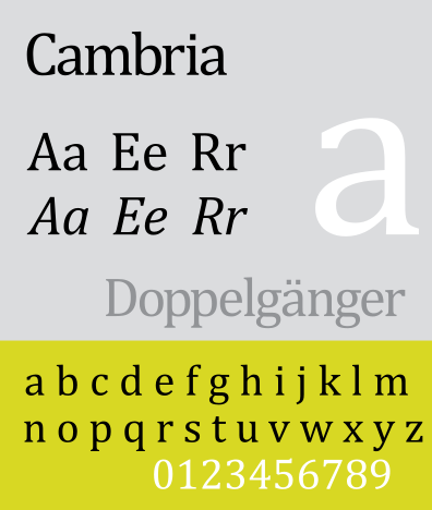 Cambri